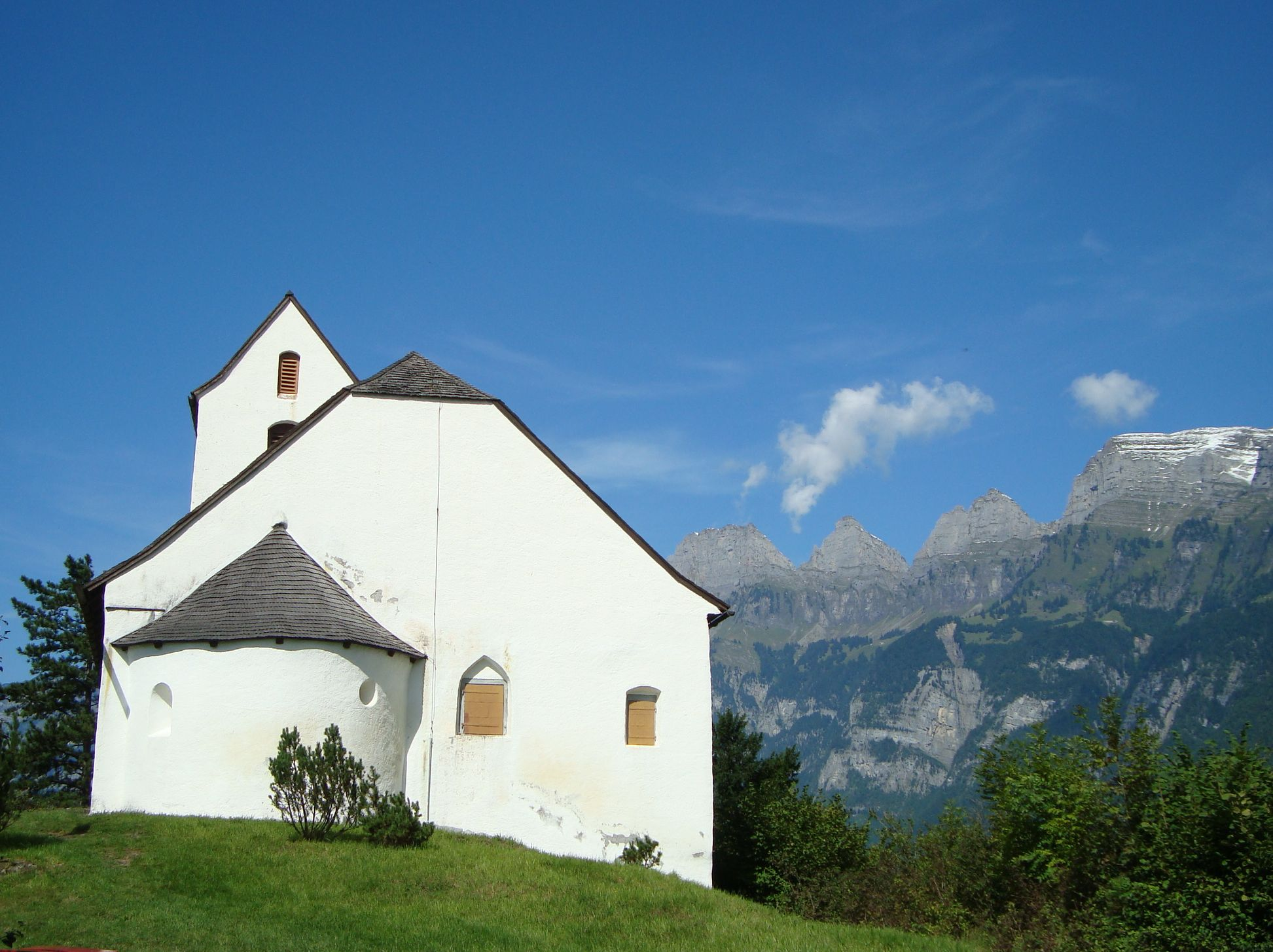 Sankt Georgskapelle bei Berschis, Ansicht von der Richtung Südost